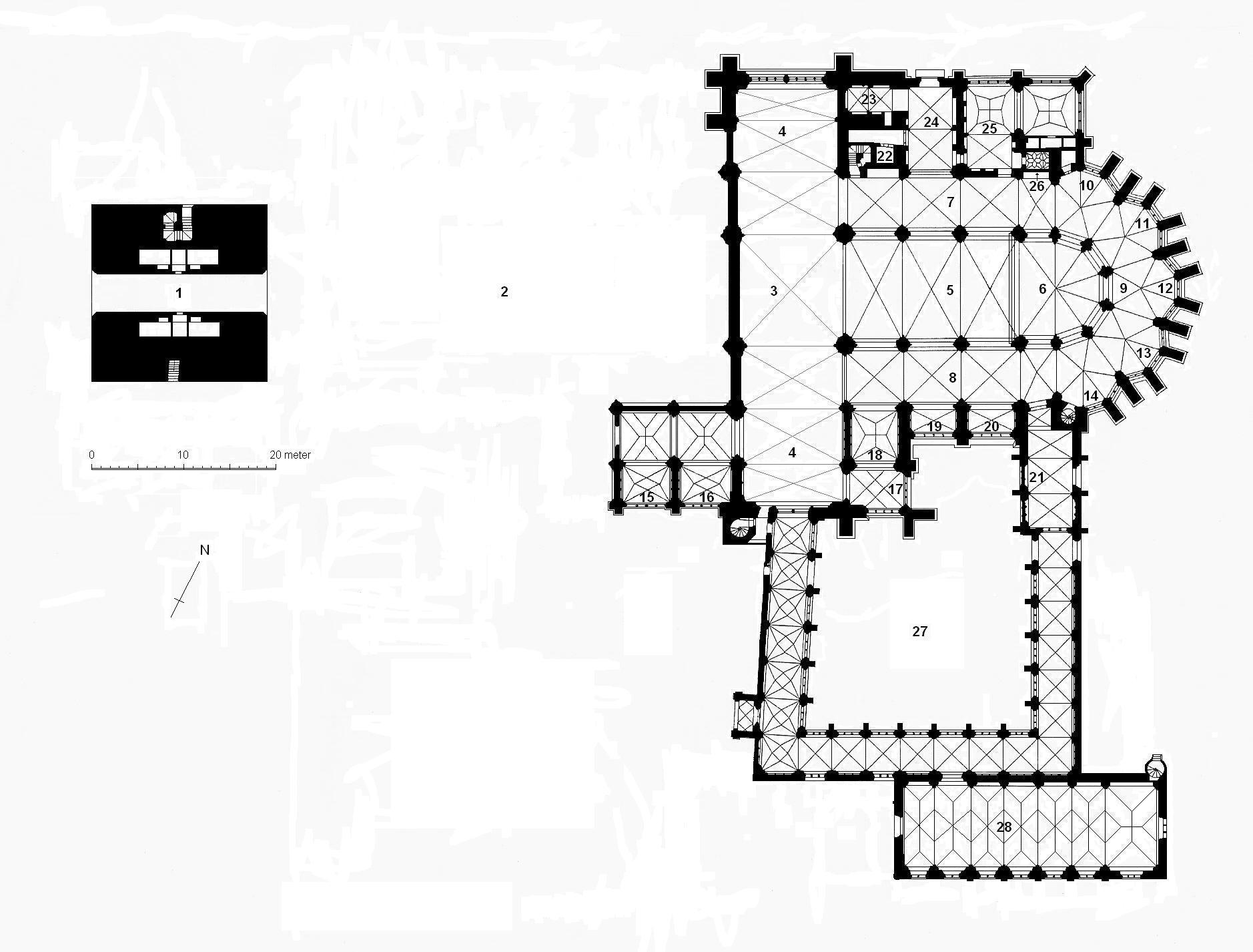 Plattegrond Domkerk